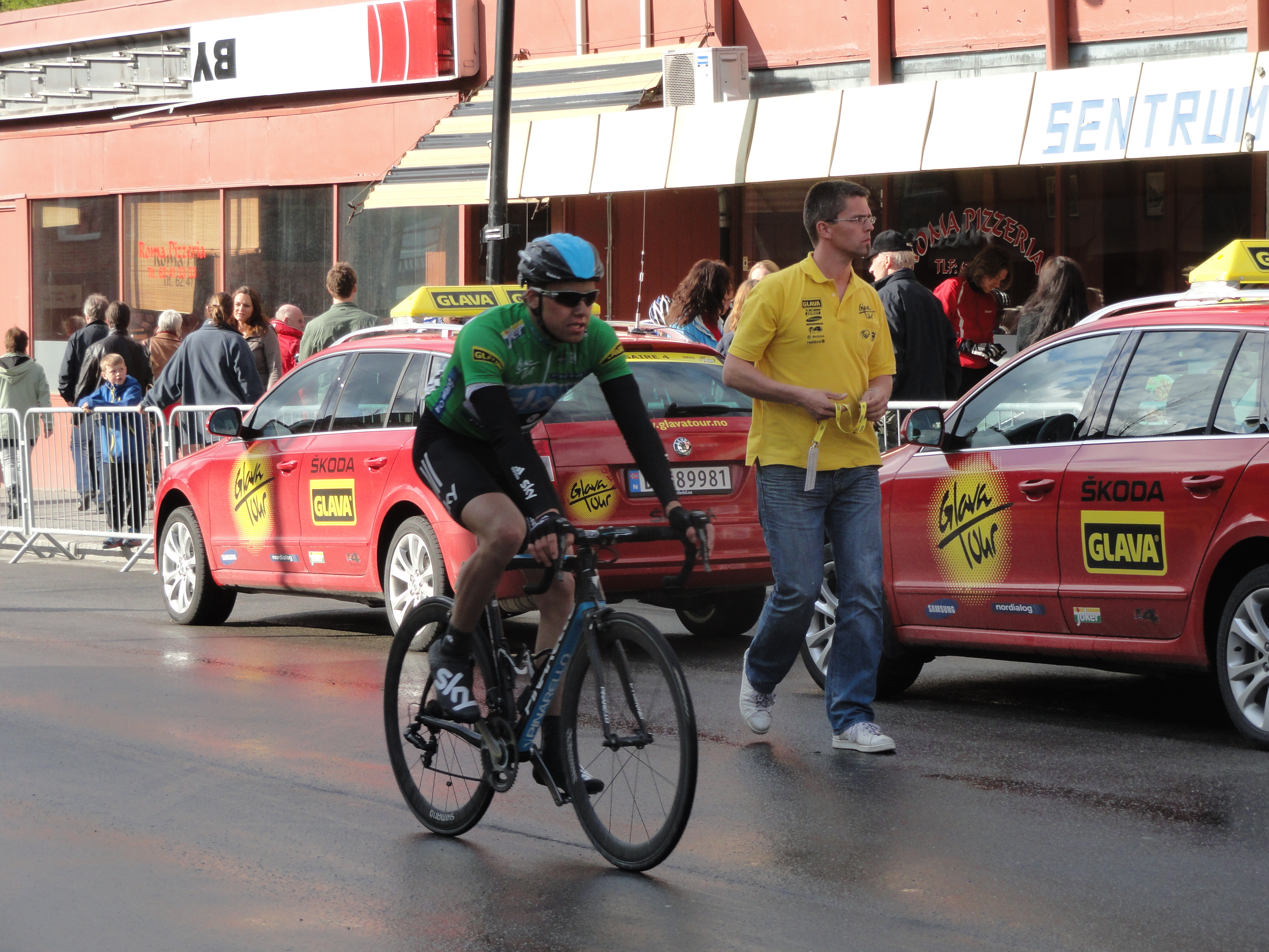 Vinner av Poengkonkurransen i ToN 2012